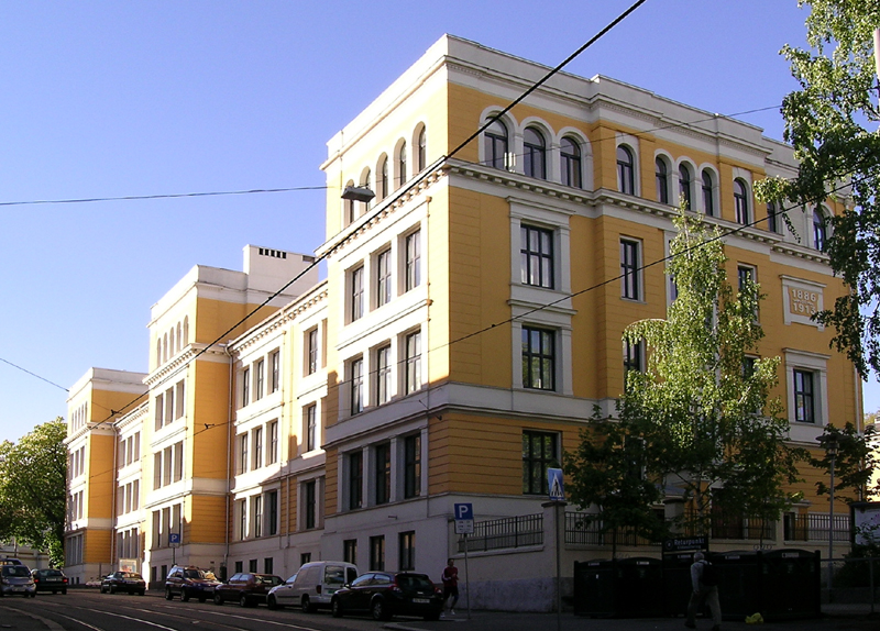 Uranienborg skole, Briskebyveien 7, Oslo. Bygd 1886. Arkitekt: Ove Ekman.